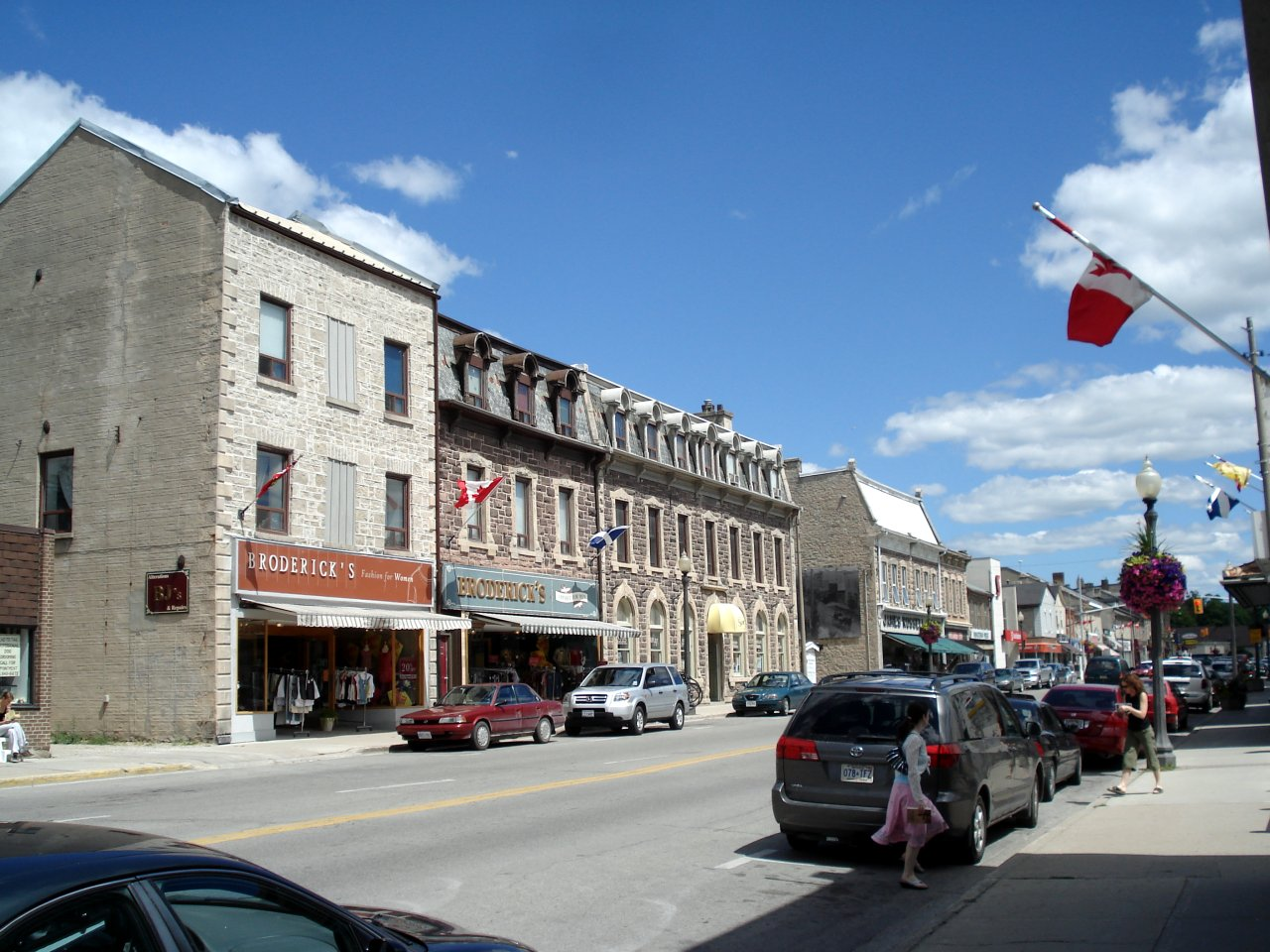 St. Andrew Street E in Fergus, Ontario